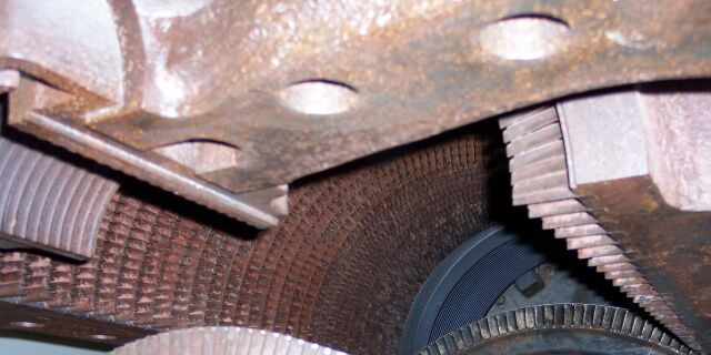 Leitwerk einer Dampfturbine, eigenes Bild GFDL